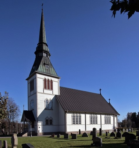 Valdshults kyrka i Gislaveds kommun